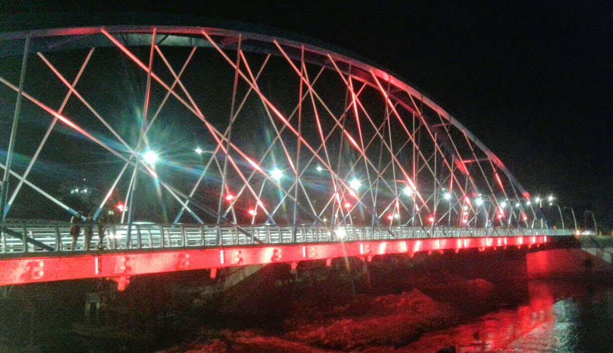 Puente del bicentenario. Conecta a las localidades de Villa Nueva y Villa María, Córdoba, Argentina.